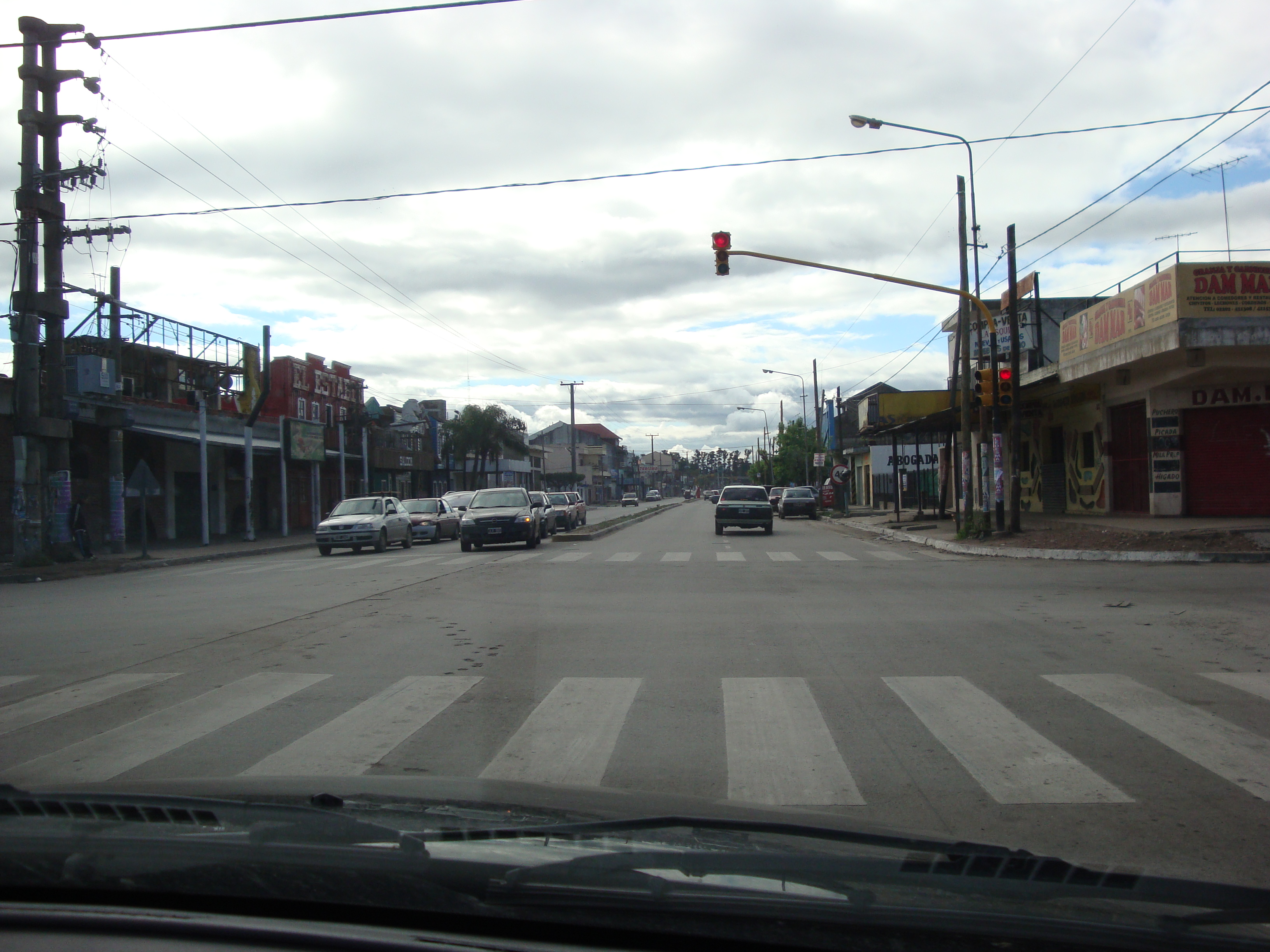 Ruta Provincial 21, en González Catán, Provincia de Buenos Aires.